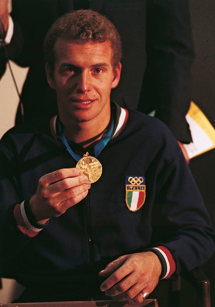 Klaus Dibiasi, 1968 Olympics